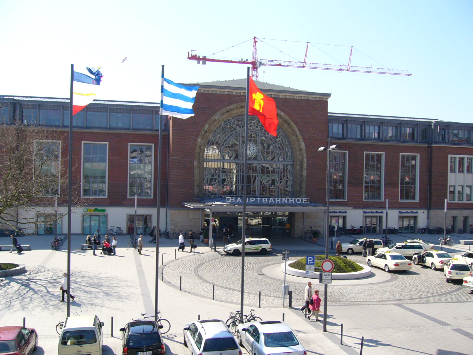 Haupteingang des Bahnhofs der Stadt Kiel